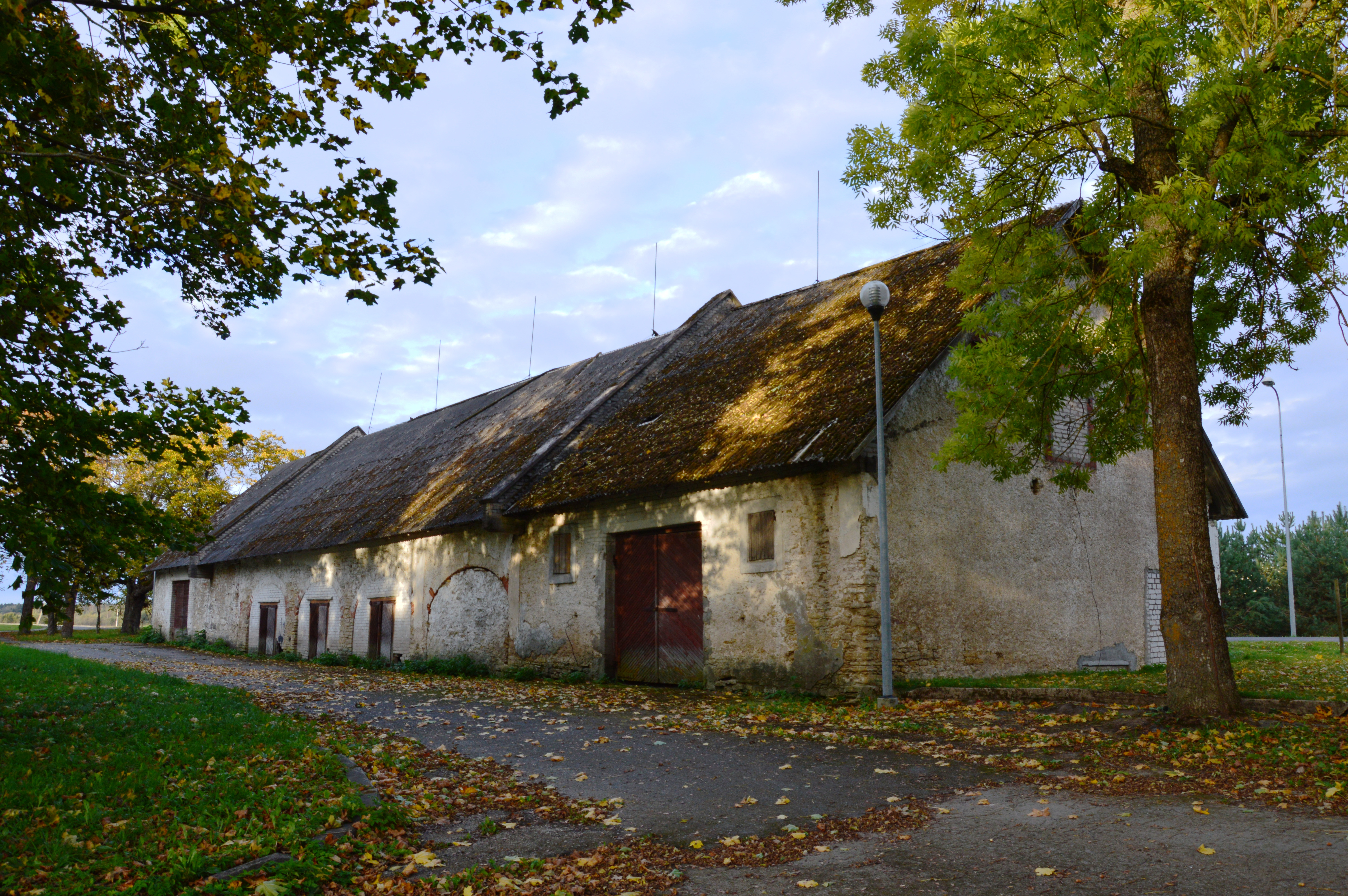 Kiikla mõisa tall-tõllakuur